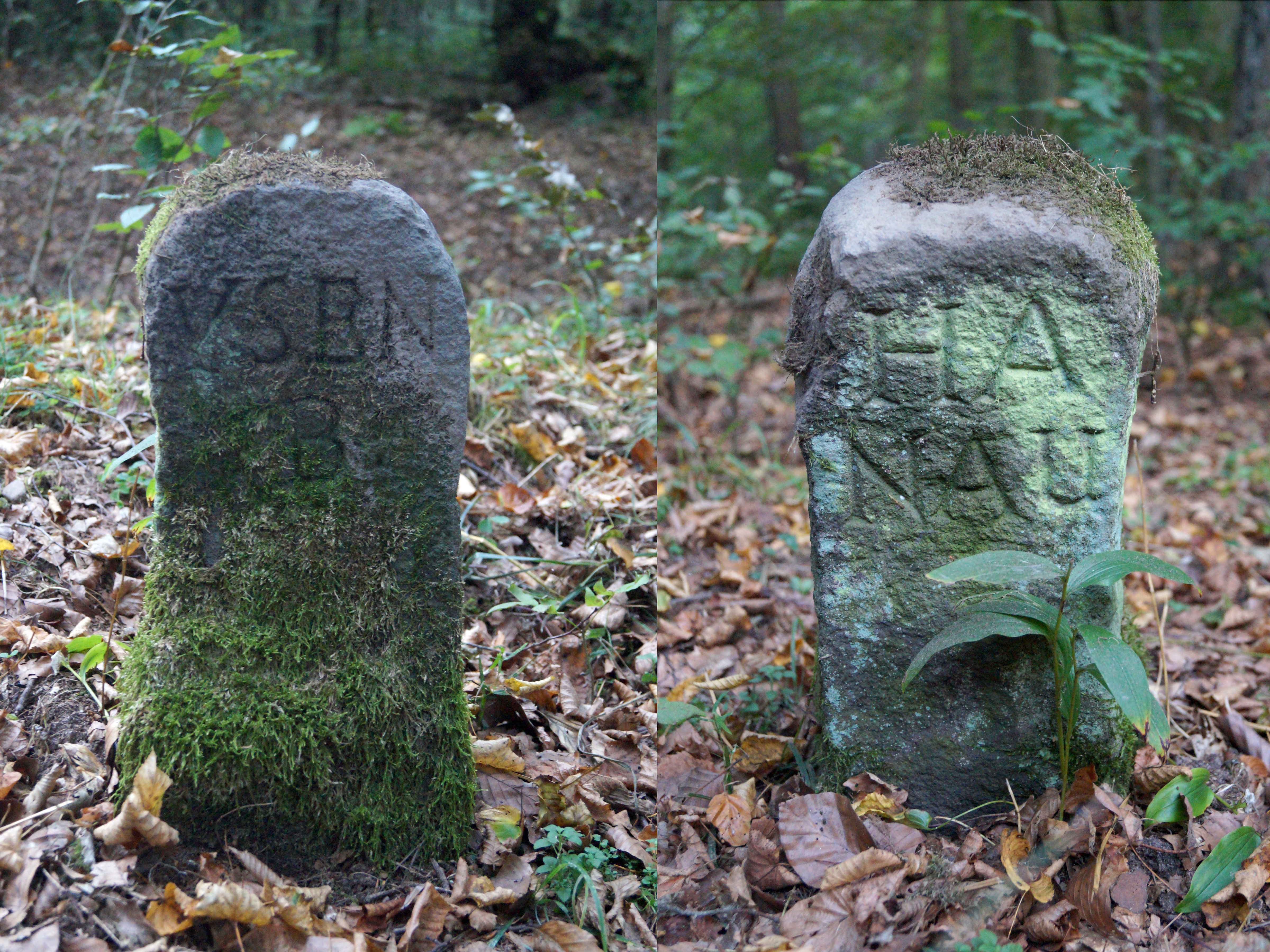 Historische Grenzsteine im Lamboywald bzw. der Bulau zwischen Hanau und Erlensee. Die Steine befinden sich entlang des historischen Grenzwall mit Graben regelhaft ca. alle 20 m, sind aber größtenteils stärker eingesunken als dieses Exemplar. Links die Nordseite (YSEN/B), rechts Südseite (HA/NAU).